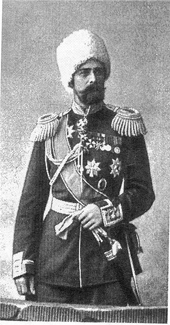 Князь Дмитрий Борисович Голицын